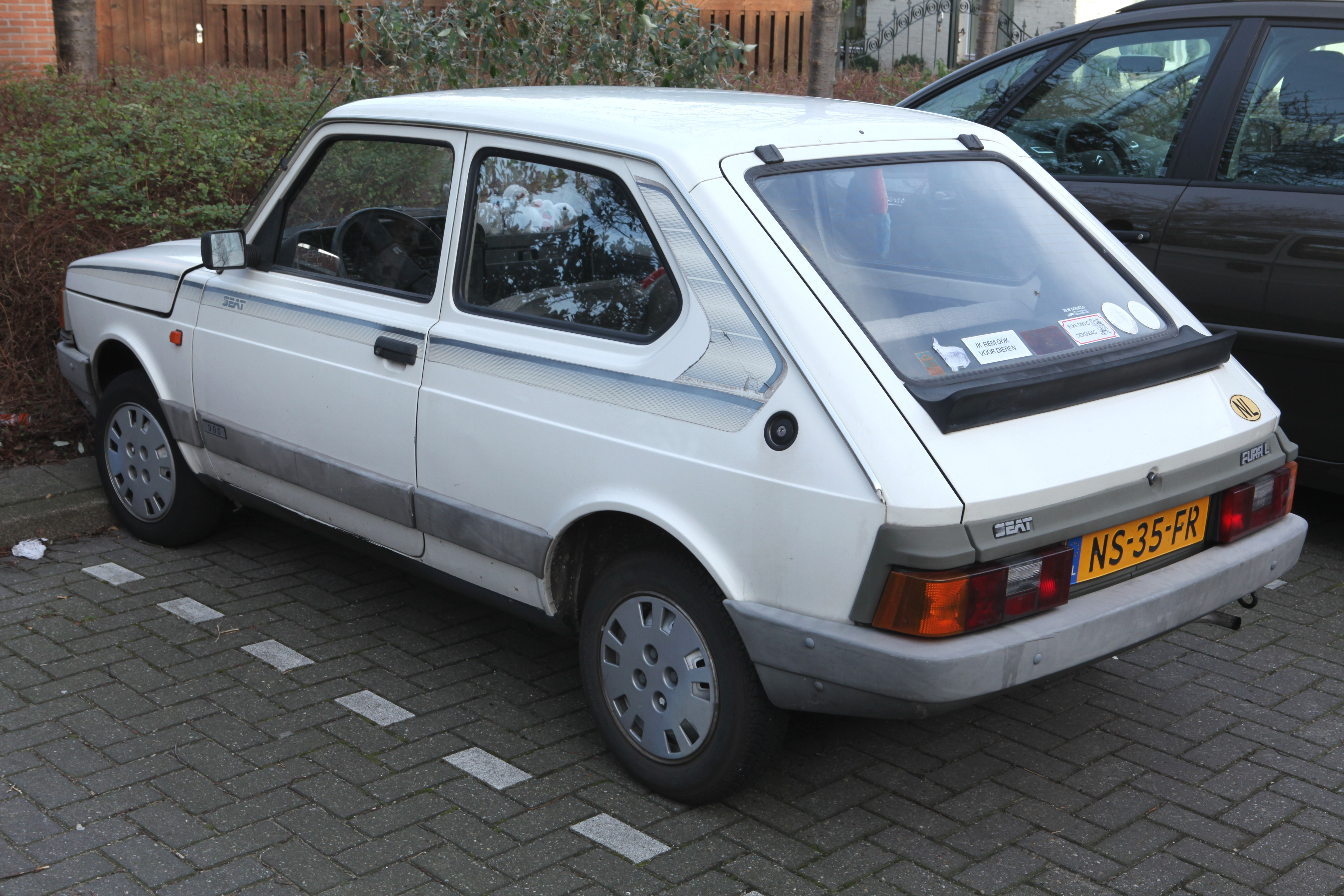 1985 SEAT Fura L